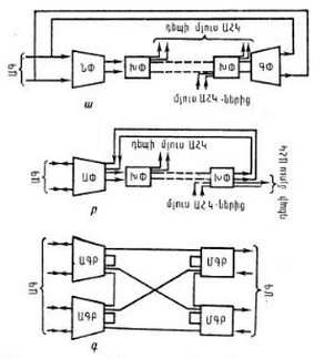 Հեռախոսայինկայան